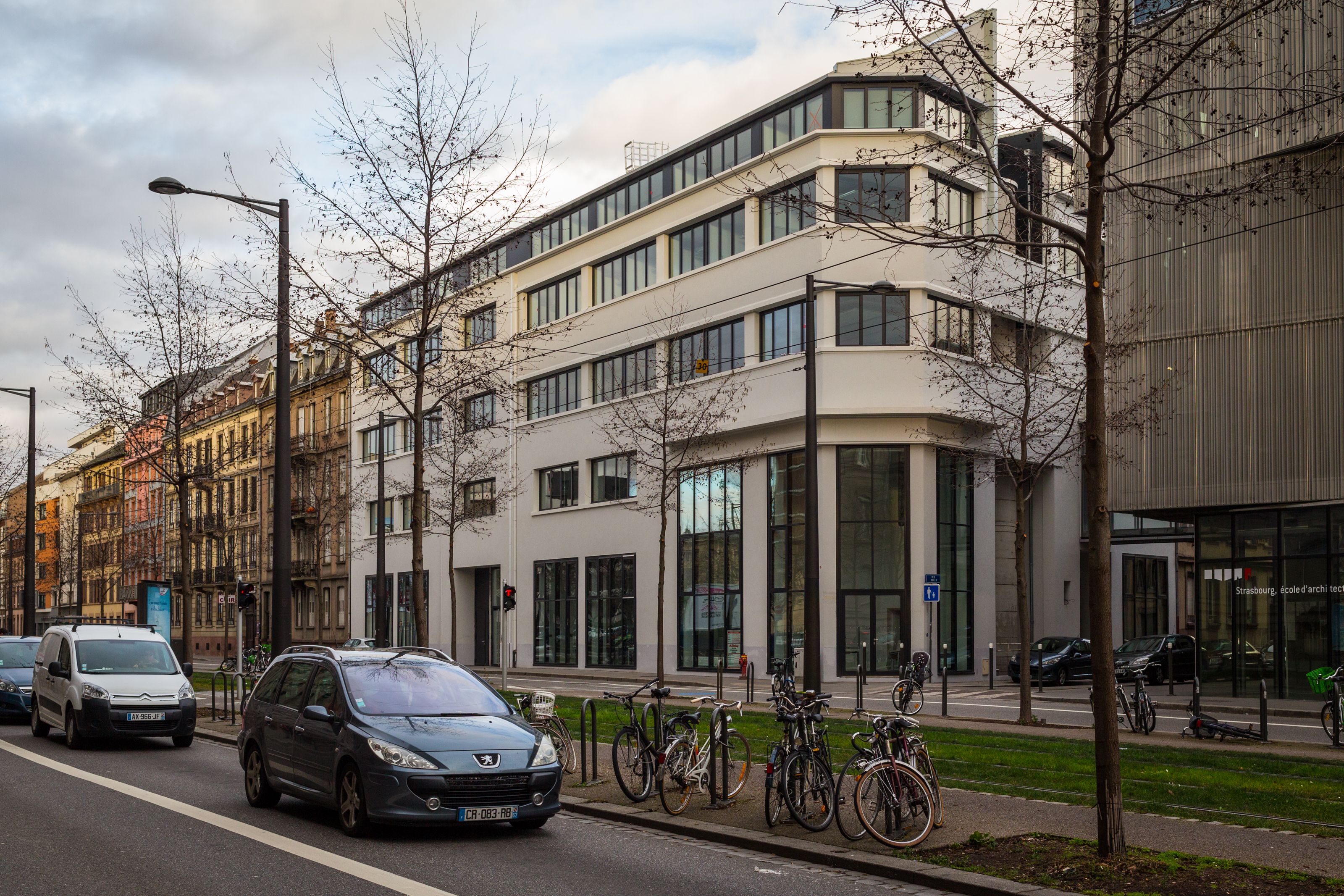 Le « Garage ».